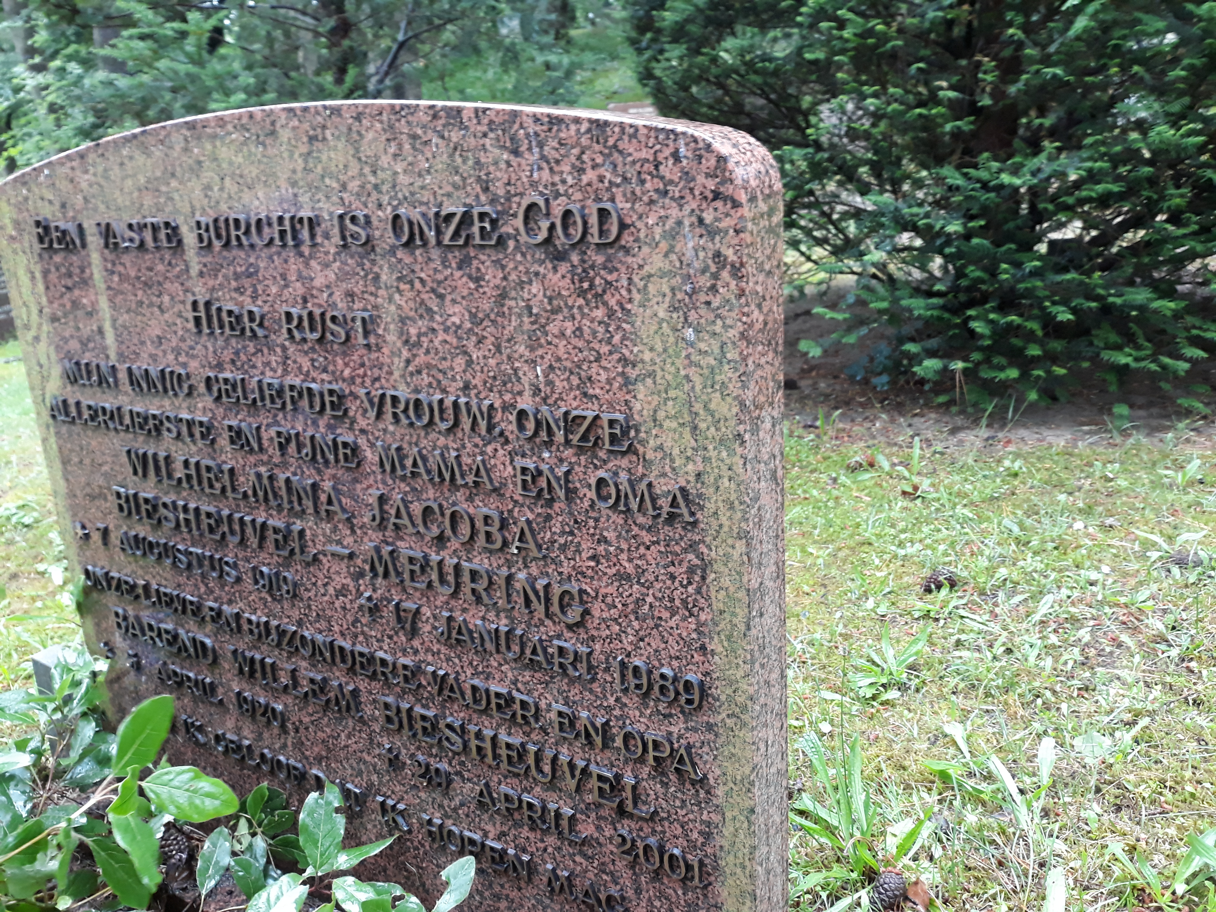 Das Grab des niederliändischen Politikers Barend Biesheuvel und seiner Ehefrau Wilhelmina Jacoba ("Mies") Meuring auf dem Allgemeene Beraafplats aan de Bergeweg in Bloemendaal.